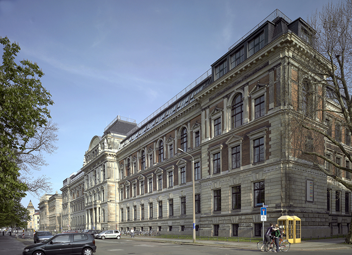 HGB Außenansicht